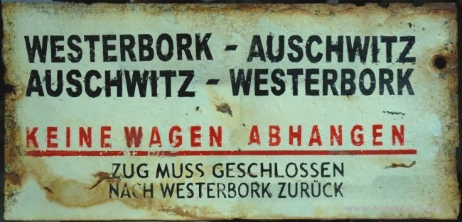 Treinbord Westerbork-Auschwitz Auschwitz State Museum